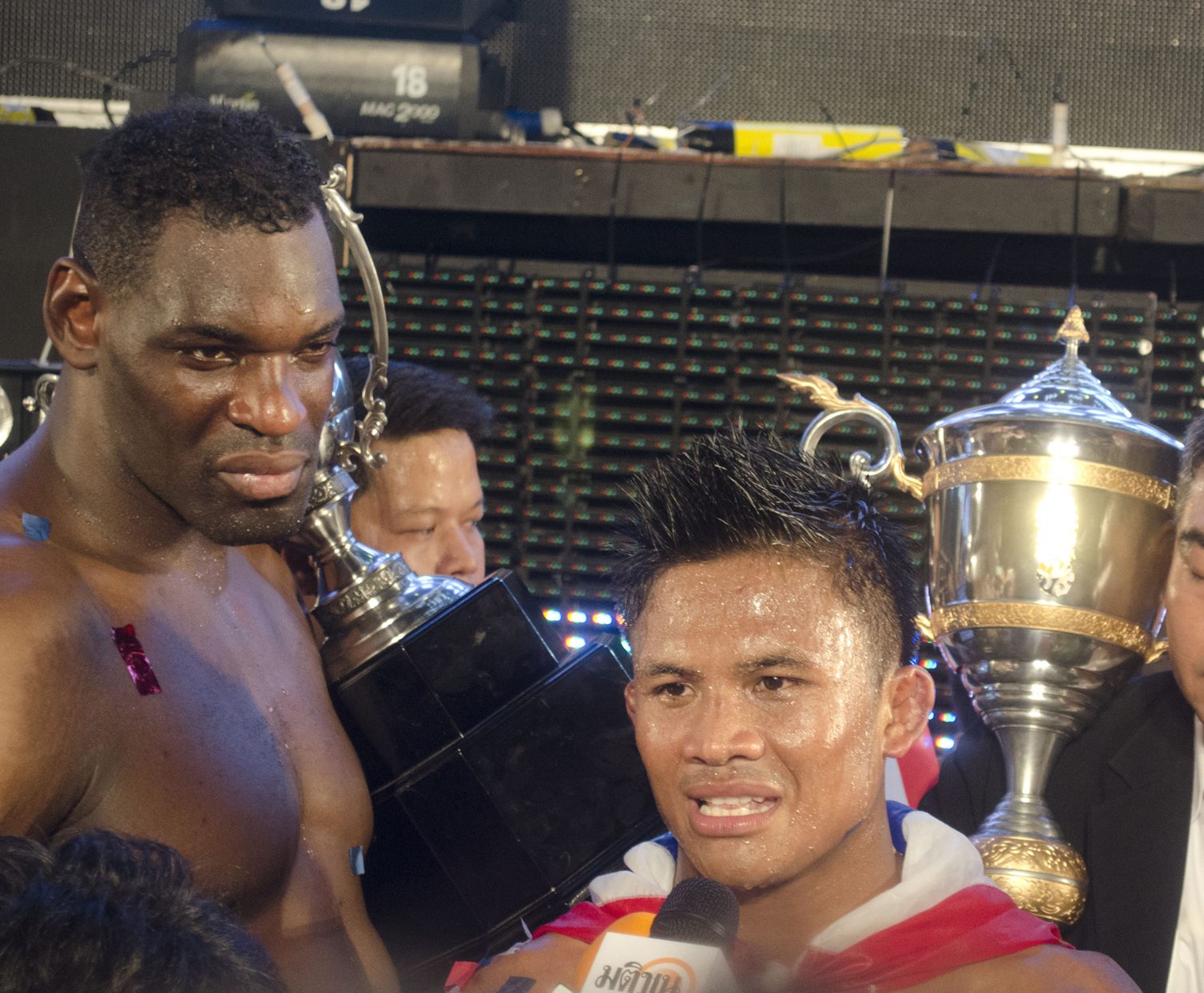 Patrice & Buakaw